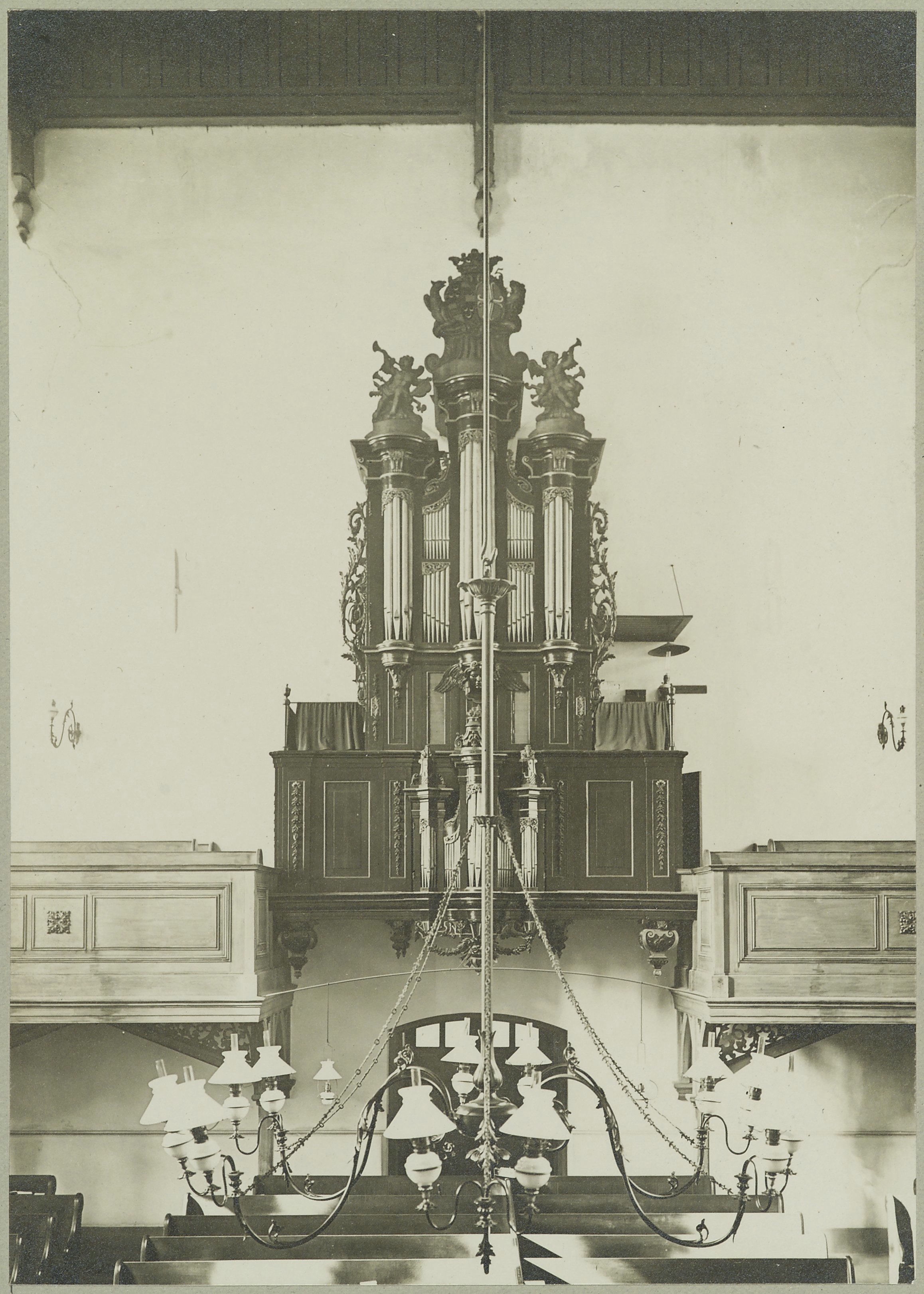 Nederlands Hervormde Kerk: Interieur orgel